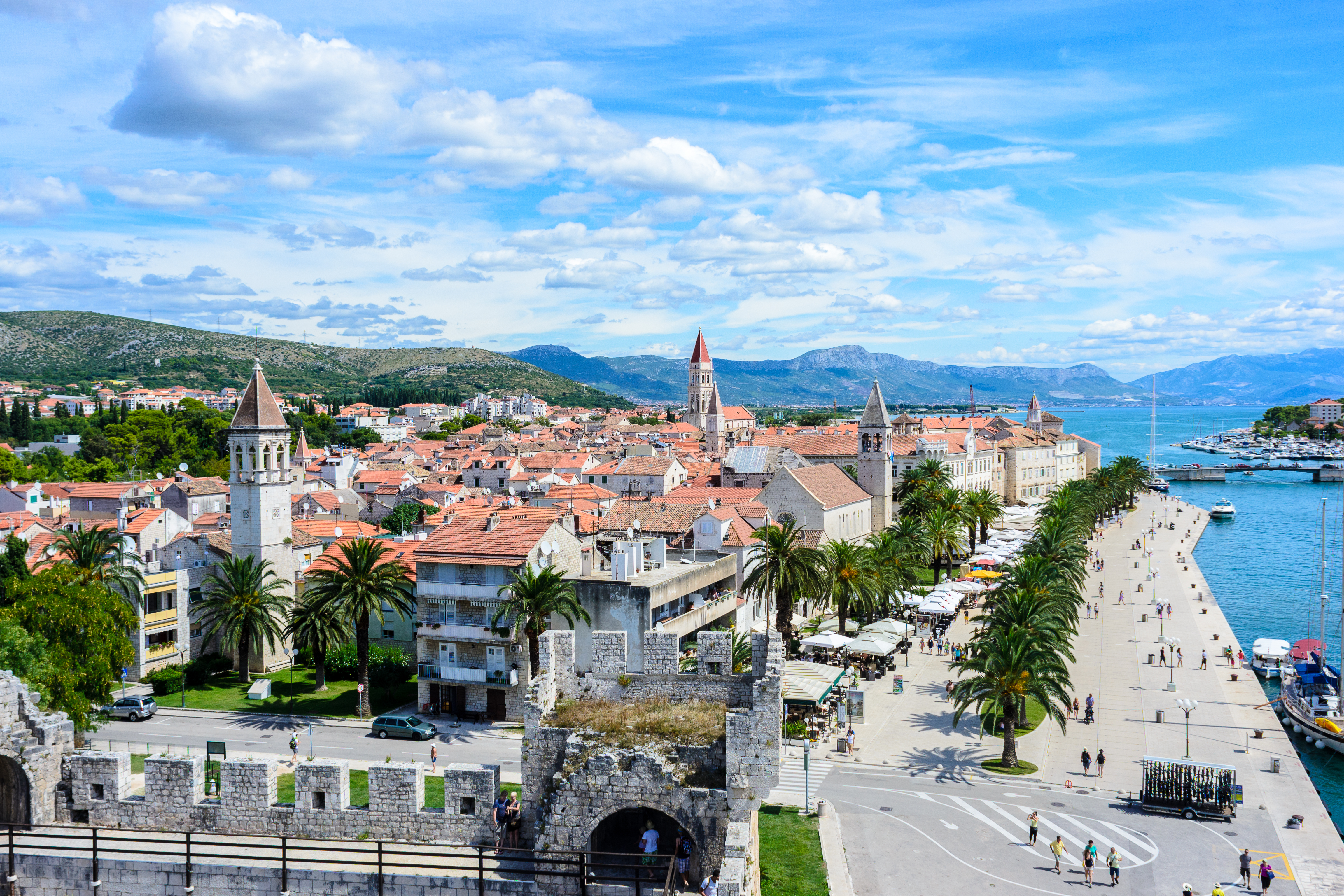 Trogir